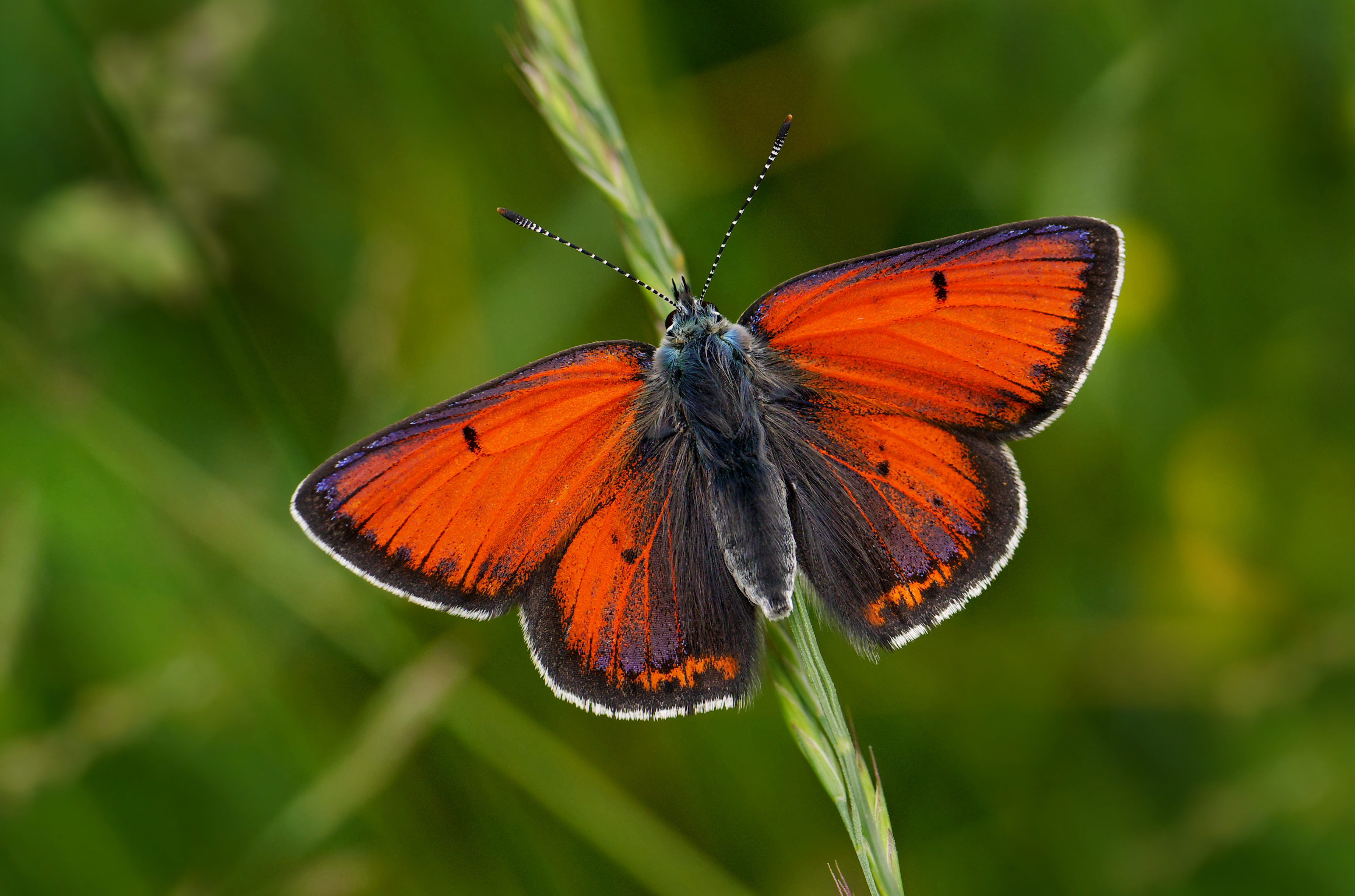 Panasonic GX7 + Leica DG Macro-Elmarit 45mm F2.8 ASPH OIS